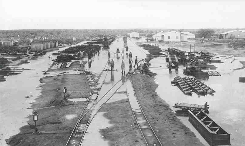 Omaruru rail station in 1906 (Namibia)